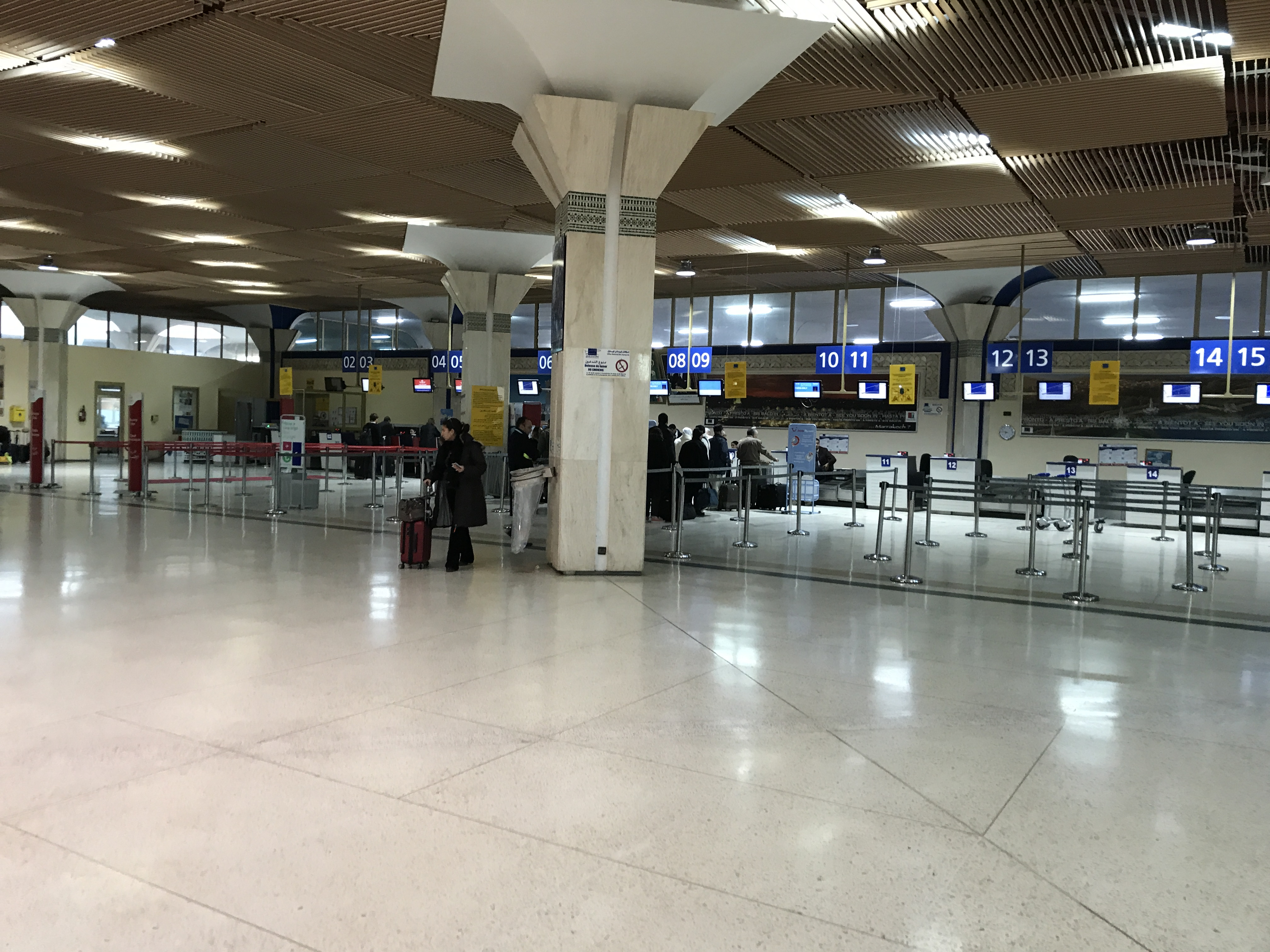 مبنى إنجار إجراءات السفر للمسافرين المغادرون من مطار أكادير المسيرة الدولي